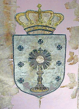 Escudo de Galiza na bandeira do Tercio de Galicia en Bos Aires.